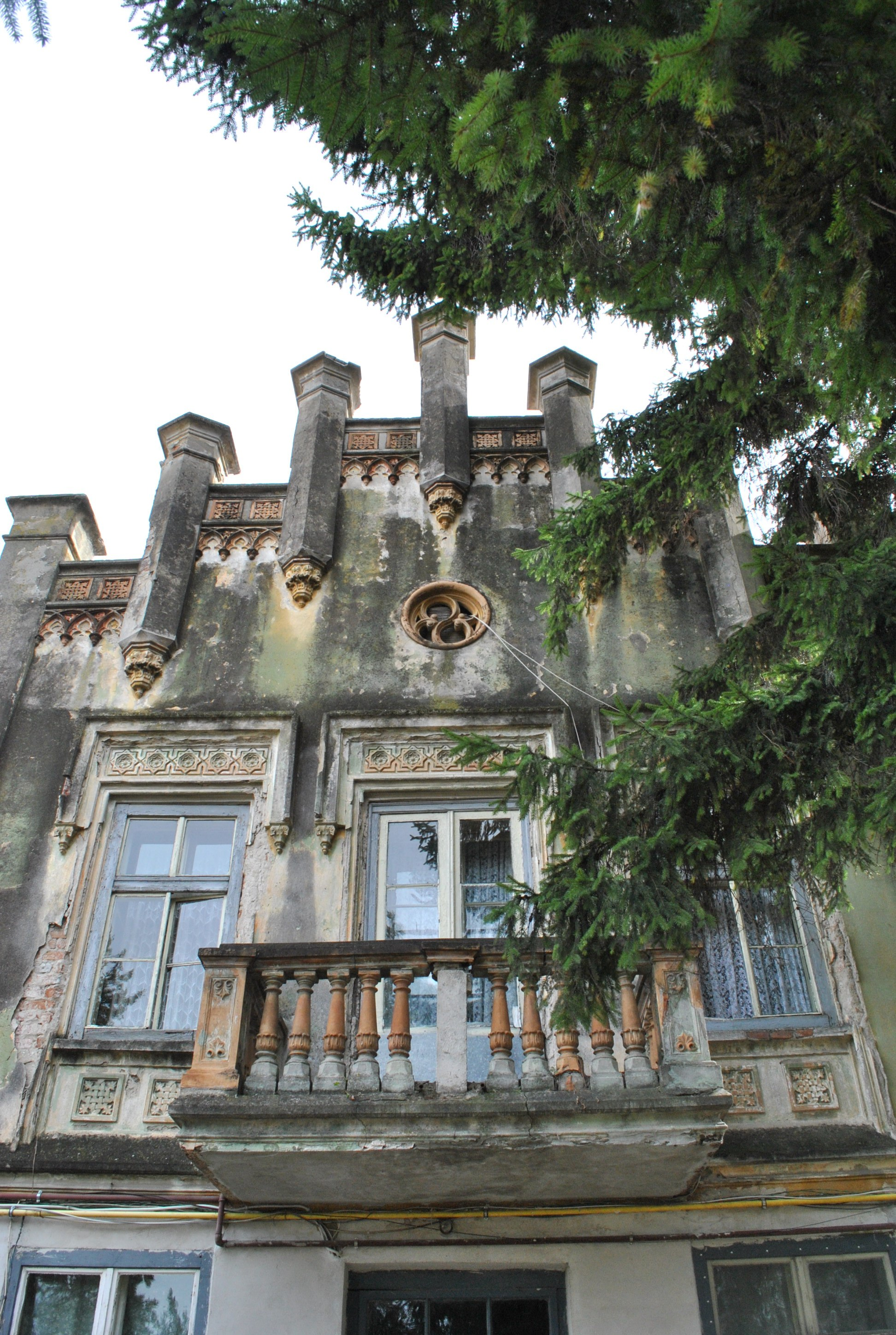 Vechea școală românească, 1850 - 1900